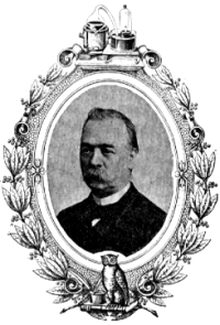 Retrato de Joaquim dos Santos e Silva (1842-1906, digit. da Revista de Química Pura e Aplicada, 2(1906)117.